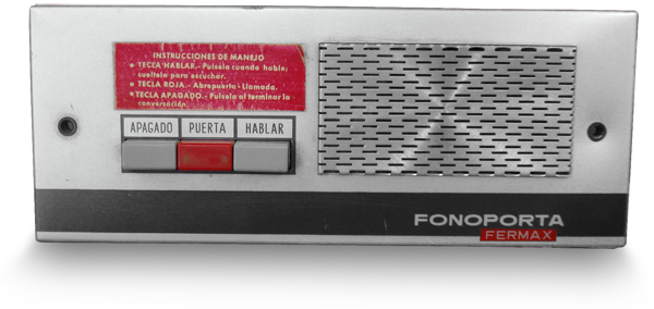 Fonoporta, uno de los primeros porteros automáticos fabricados en España